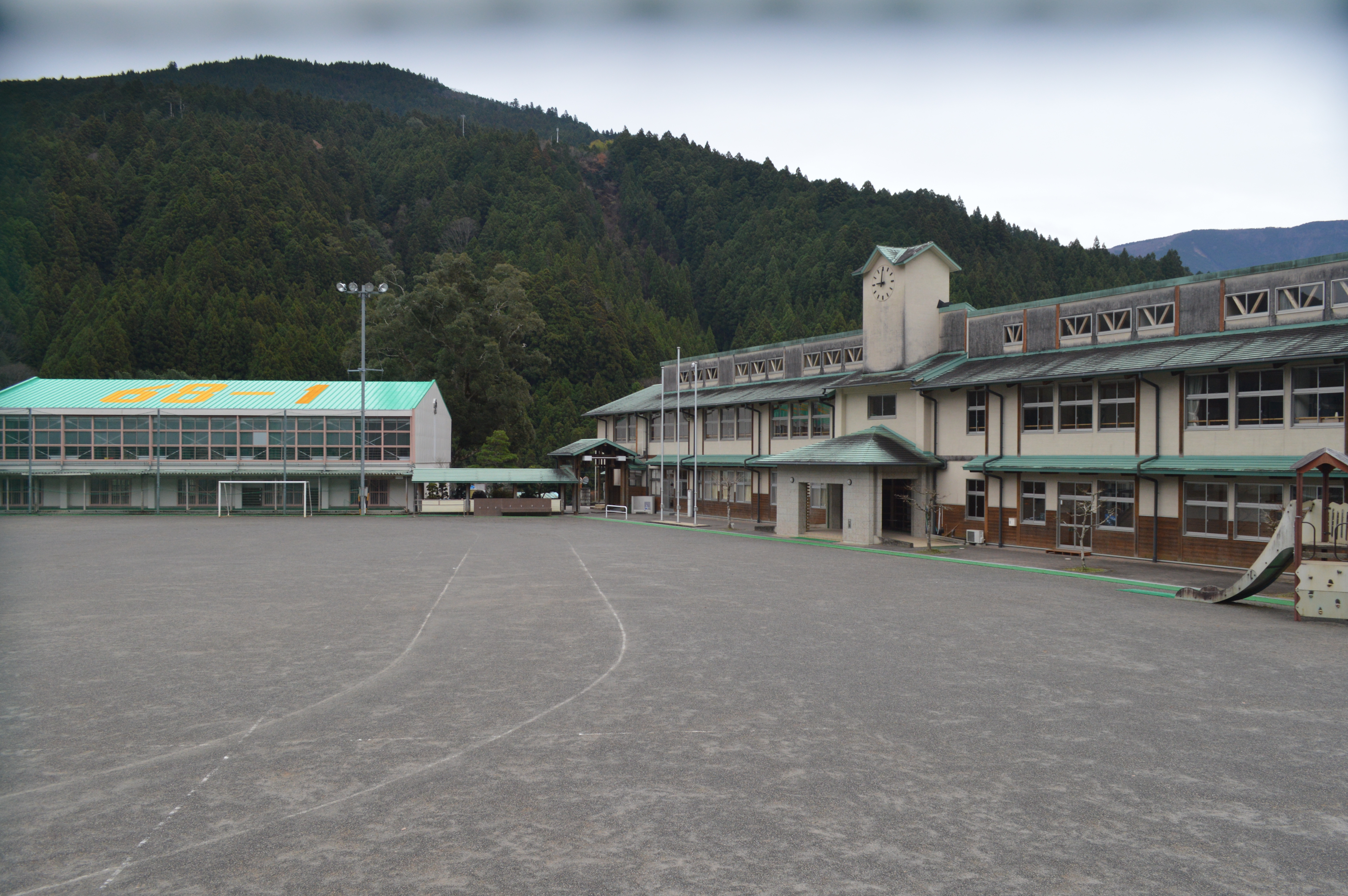 静岡県浜松市天竜区水窪町にある浜松市立水窪小学校。